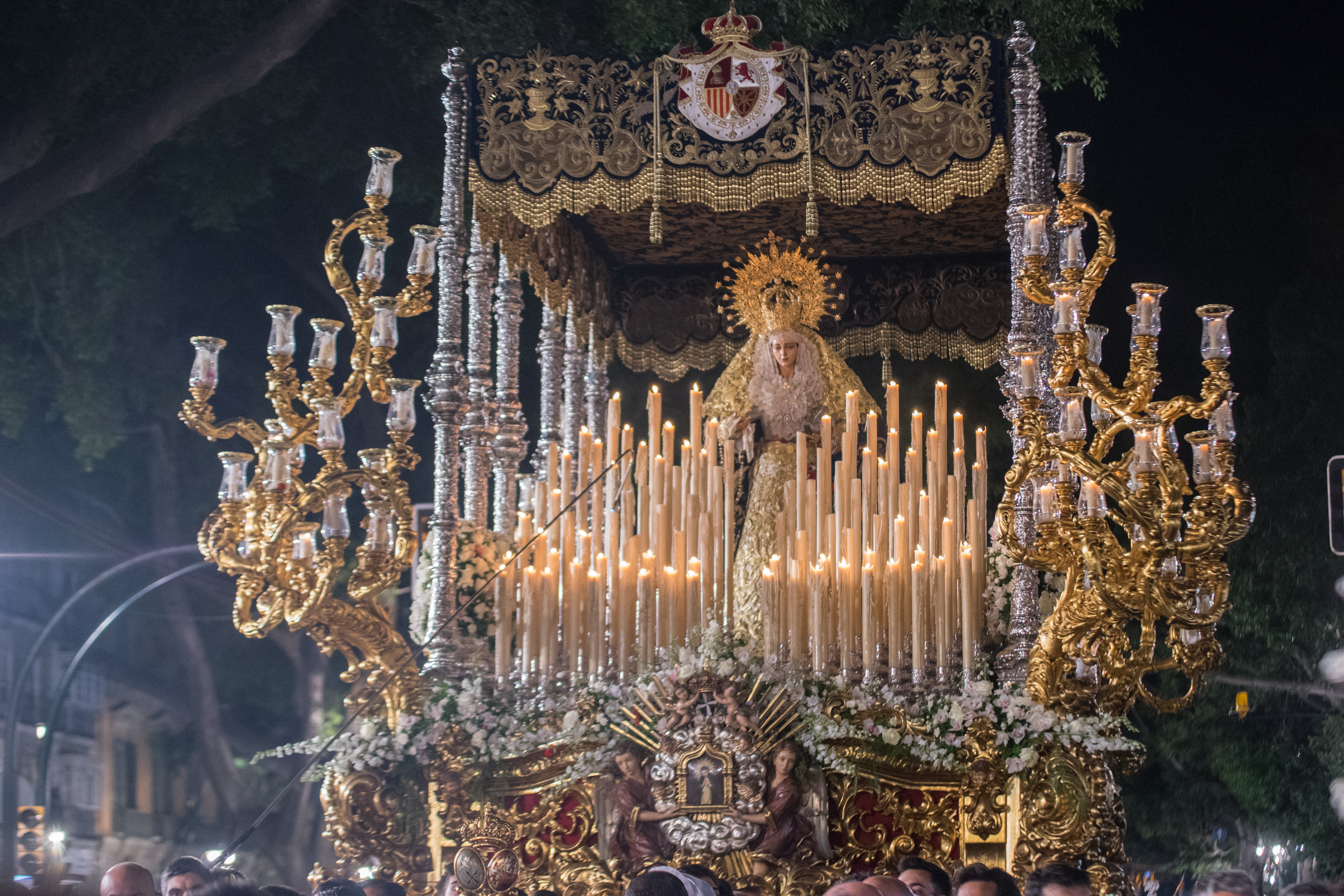 Trono de la Paloma de la Real, Muy Ilustre, Venerable y Antigua Hermandad y Cofradía de Nazarenos de Nuestro Padre Jesús de la Puente del Cedrón y María Santísima de la Paloma This is a photography of a Folklore festival in Spain (Wikidata id Q9075883).